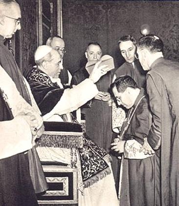 Pio XII impone la berretta cardinalizia a Giuseppe Siri presso la residenza papale di Castelgandolfo